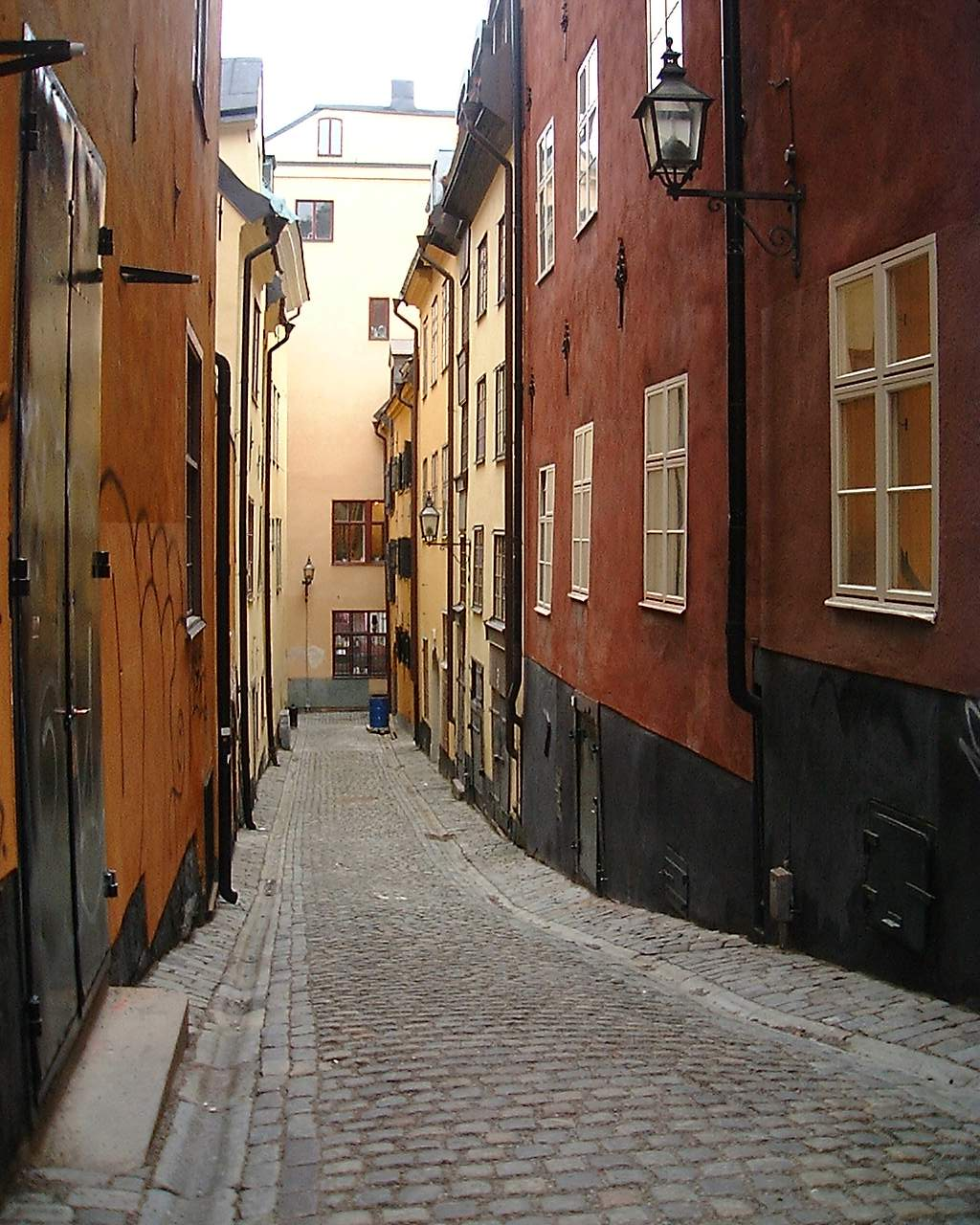 Pelikansgränd viewed from Österlånggatan.